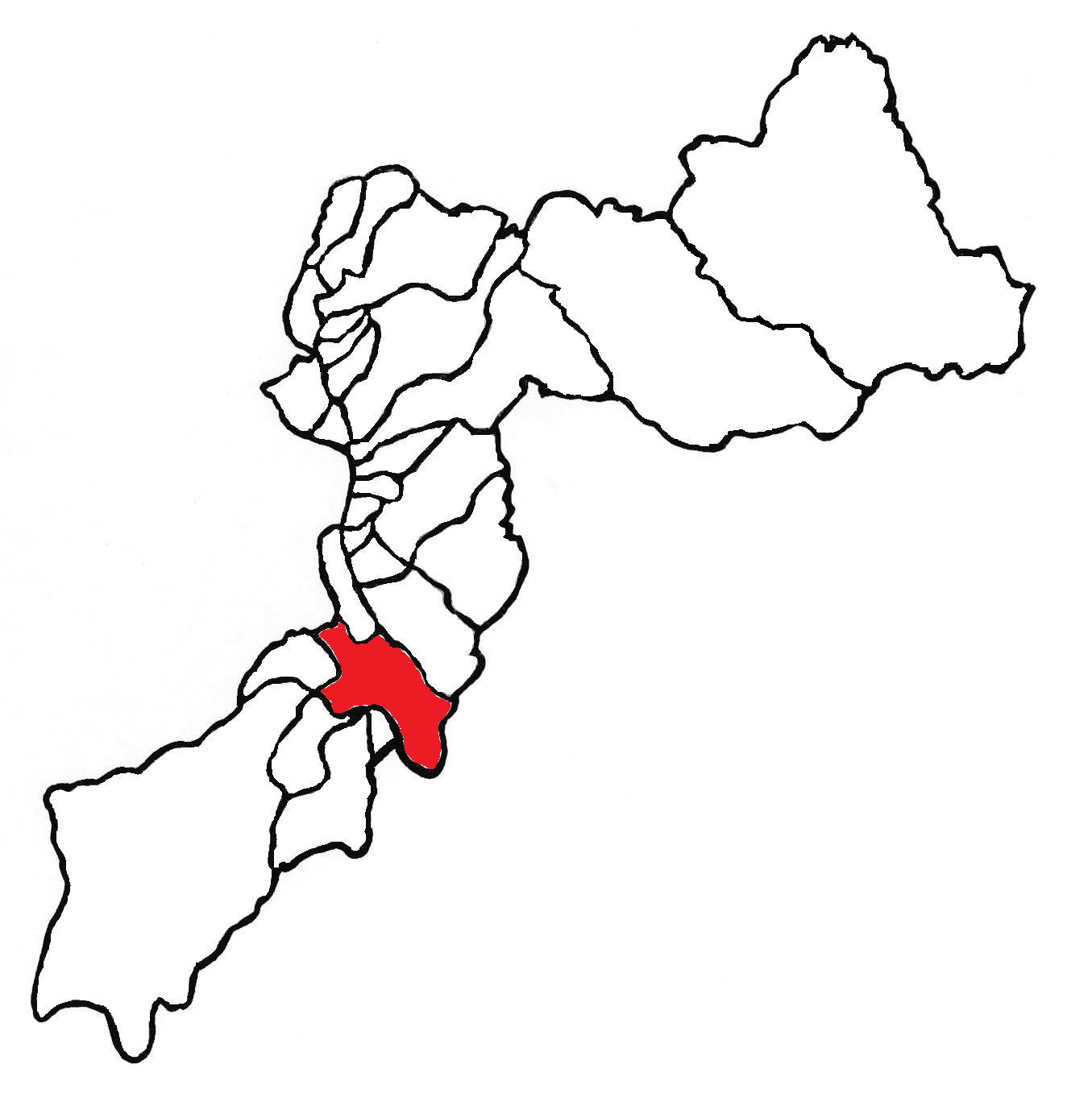 Ubicación del distrito en la provincia de Huancayo, departamento de Junín, Perú